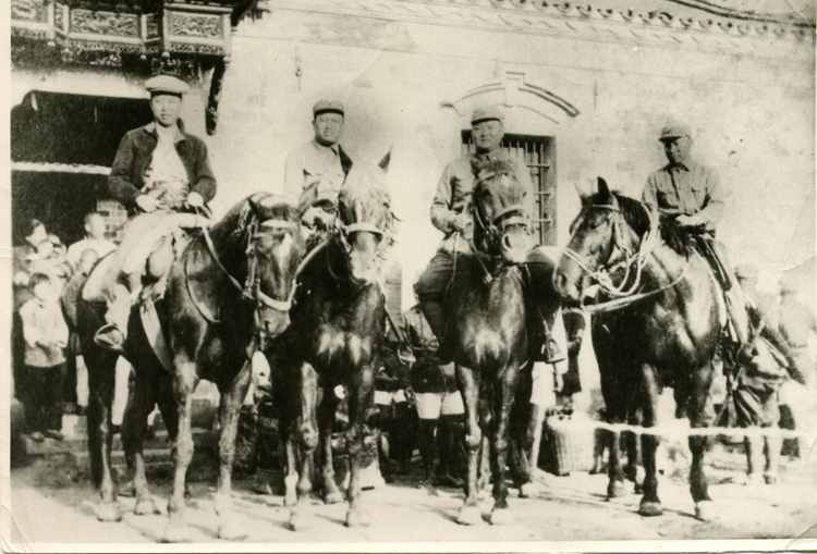 中文（中国大陆）: 1939年，赖传珠与叶挺等在东汤池新四军江北指挥部。左起：叶挺、赖传珠、罗炳辉、张云逸